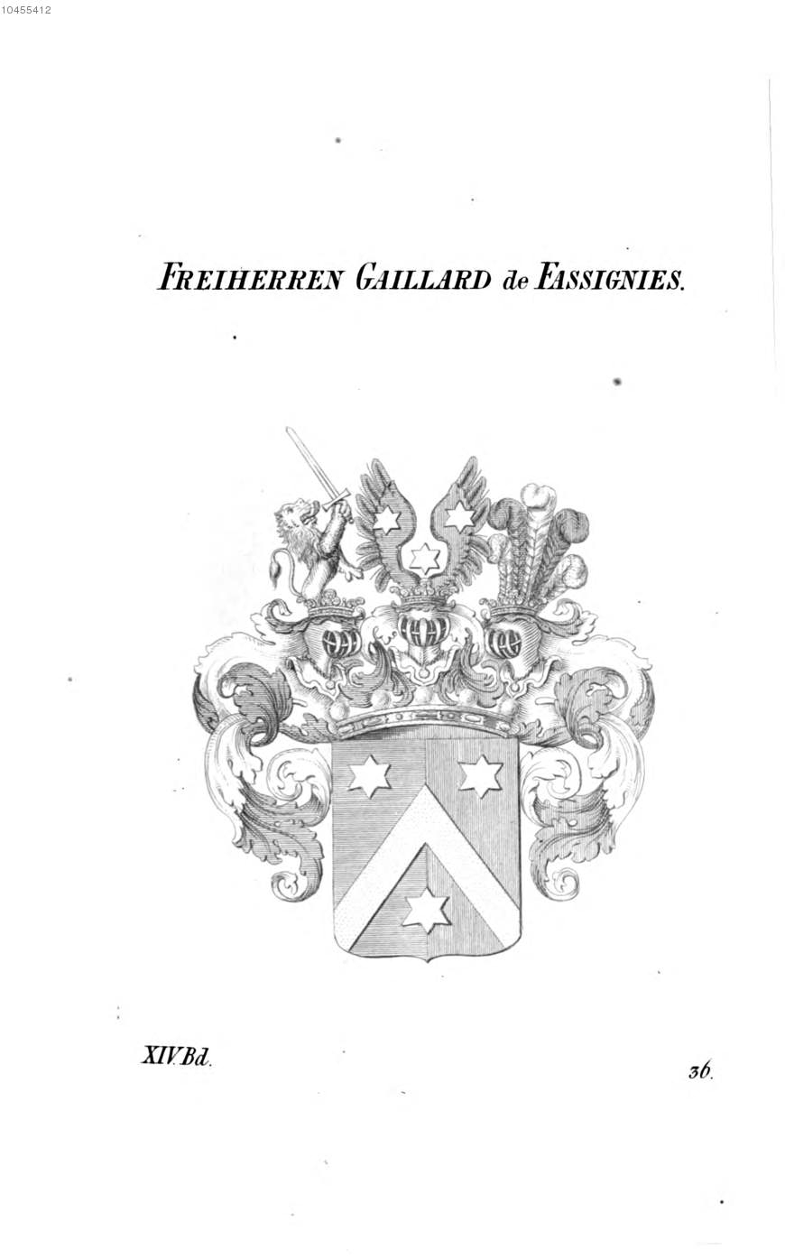 Wappen Gaillard de Fassignies - Tyroff AT.jpg